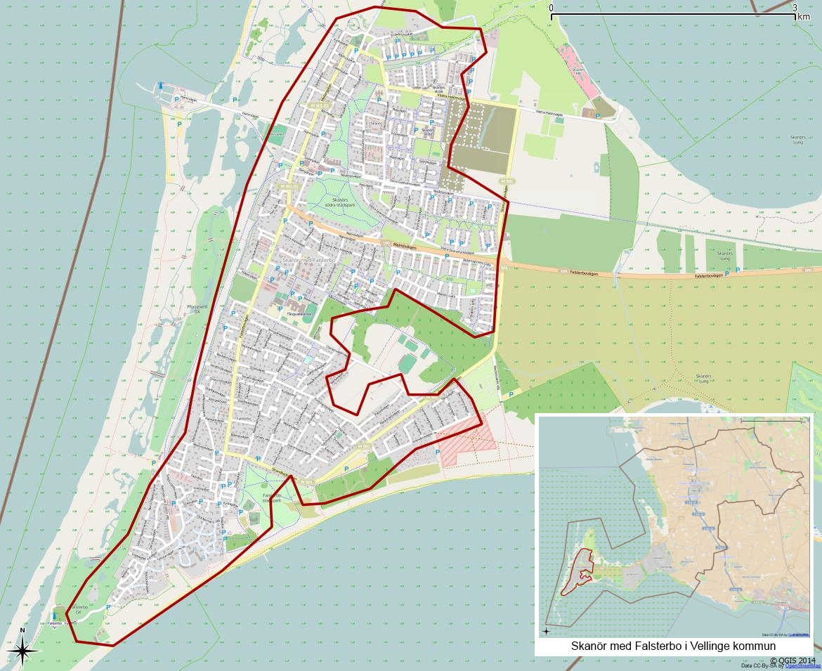 Tätorten Skanör med Falsterbos gränser 1990 enligt Atlas över rikets indelningar 1992.